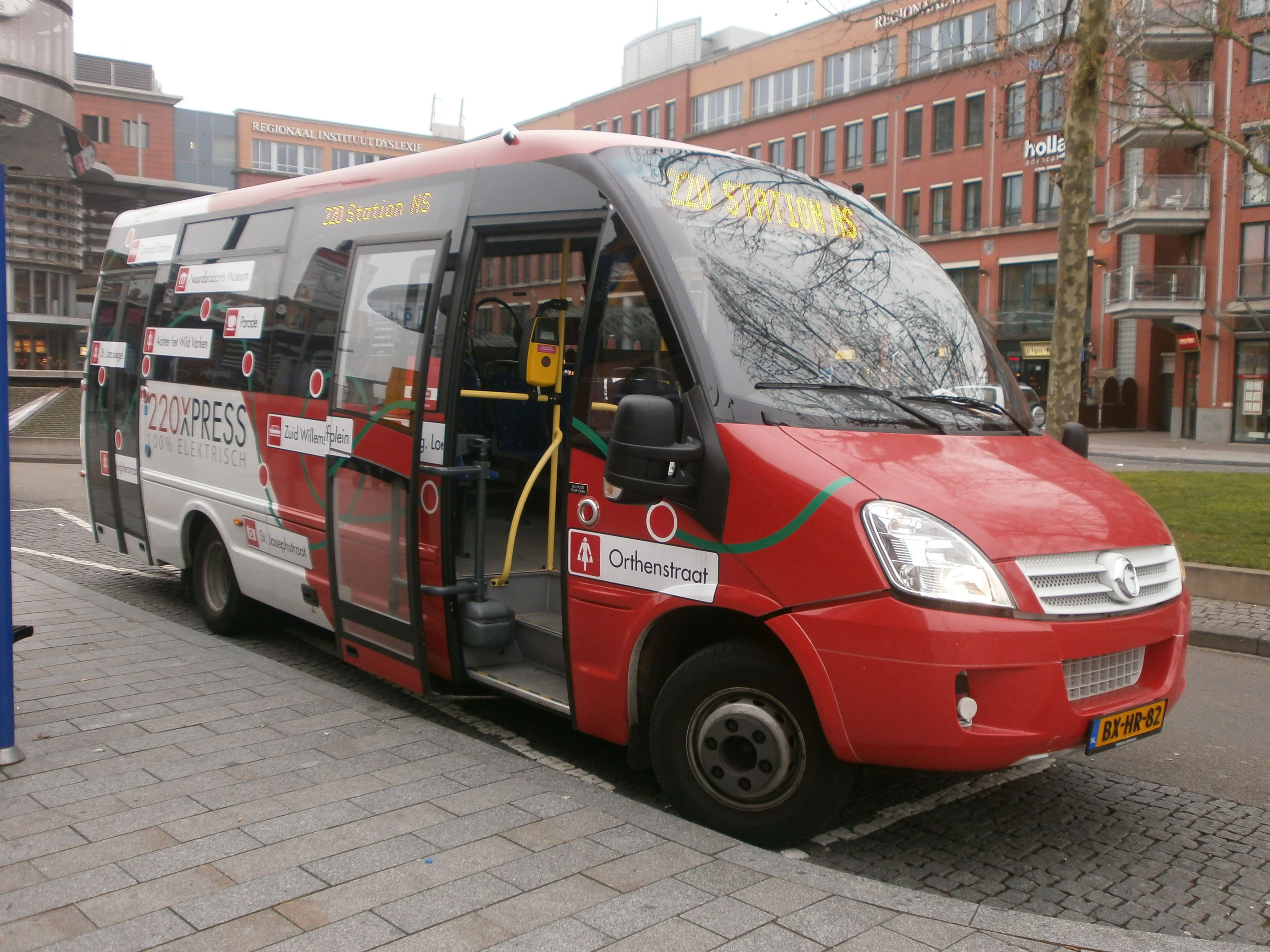 Elektrische bus die dienst doet op de 220Xpress in 's-Hertogenbosch, volgens de nieuwe huisstijl.